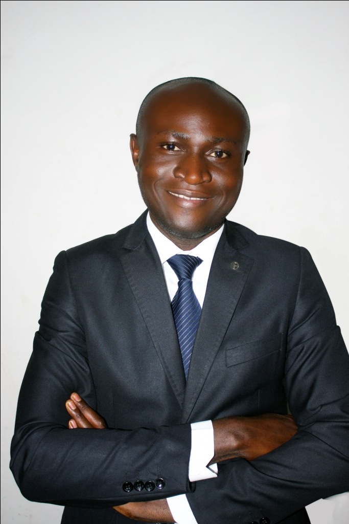 Honorable Juvénal Munubo Mubi, Membre du Parlement RDC, Député national UNC, Elu de Walikale-Nord-Kivu